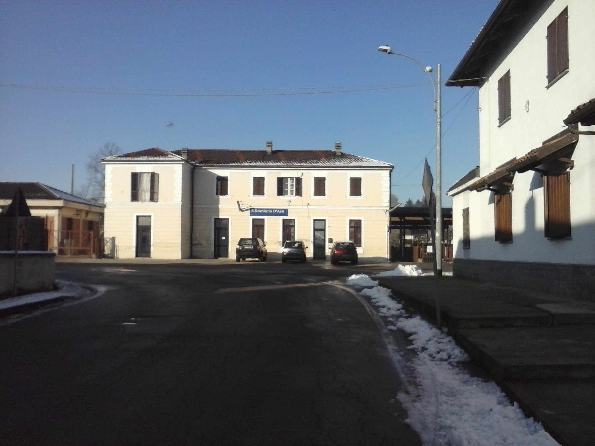 Vista frontale della stazione di San Damiano d'Asti (AT), Italia.